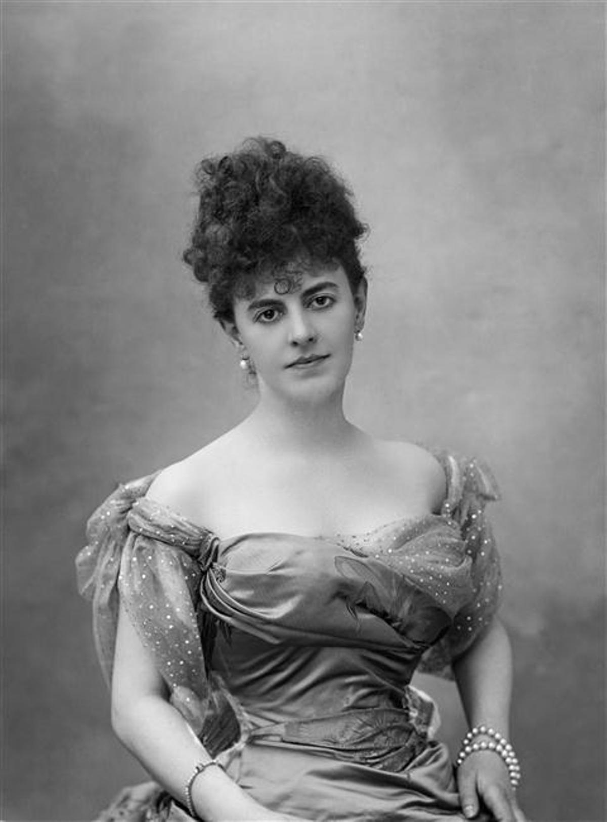 La comtesse Élisabeth de Riquet de Caraman, née Marie Joséphine Anatole Louise Élisabeth de Riquet de Caraman-Chimay, est l'épouse du comte Henry Greffulhe (1848-1932). Elle est née à Paris, le 11 juillet 1860 et décédée à Genève (Suisse), le 21 août 1952.